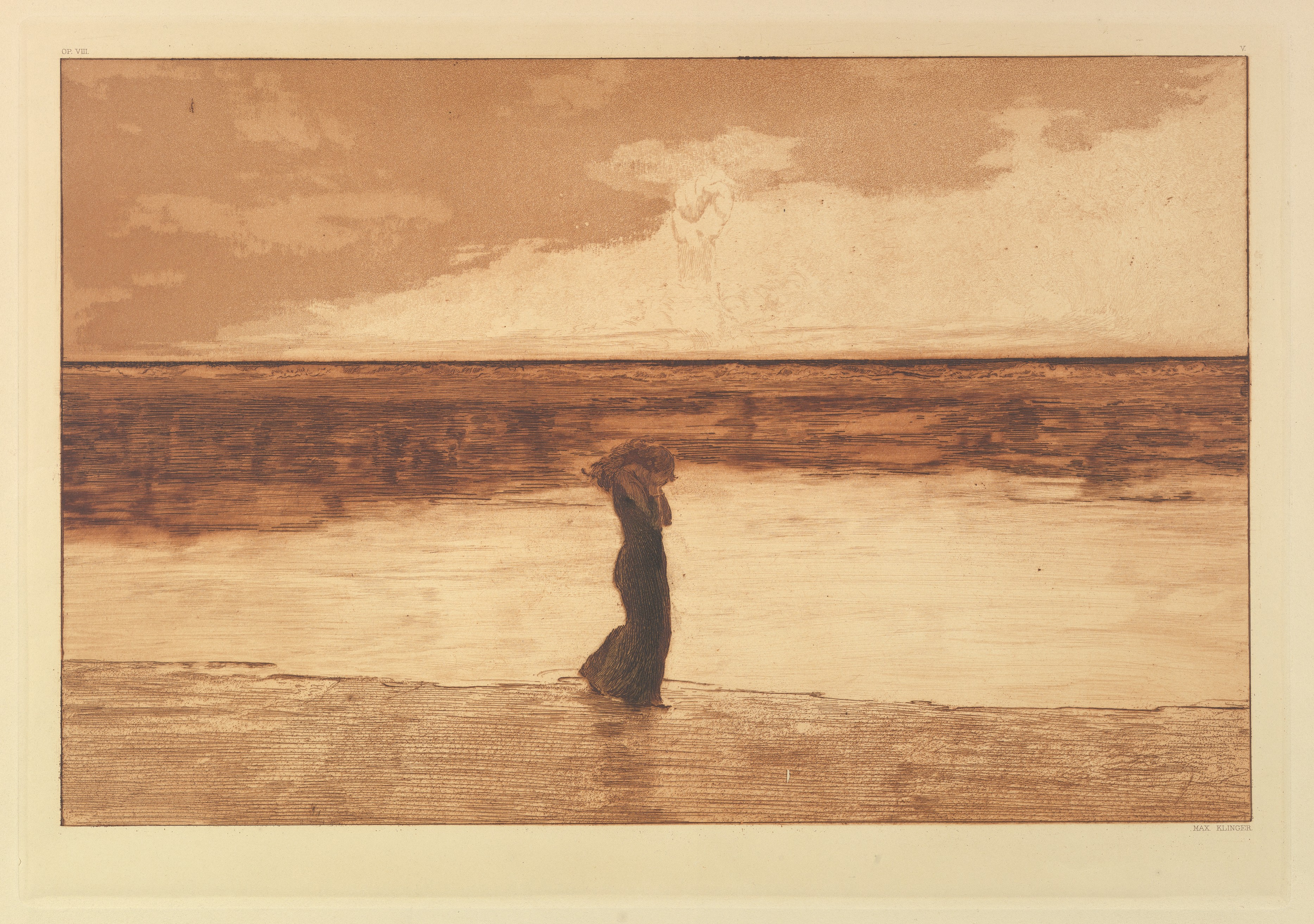 Portfolio; Portfolios